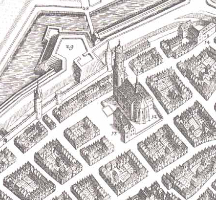 Ausschnitt aus Stadtplan von Kassel von Matthäus Merian, 1648 Straßenzüge zwischen Druselturm und Martinskirche (Kassel).